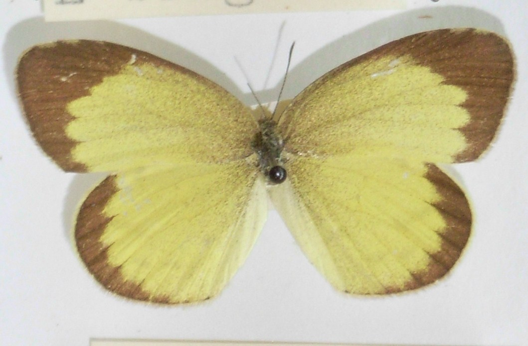 Eurema brigitta